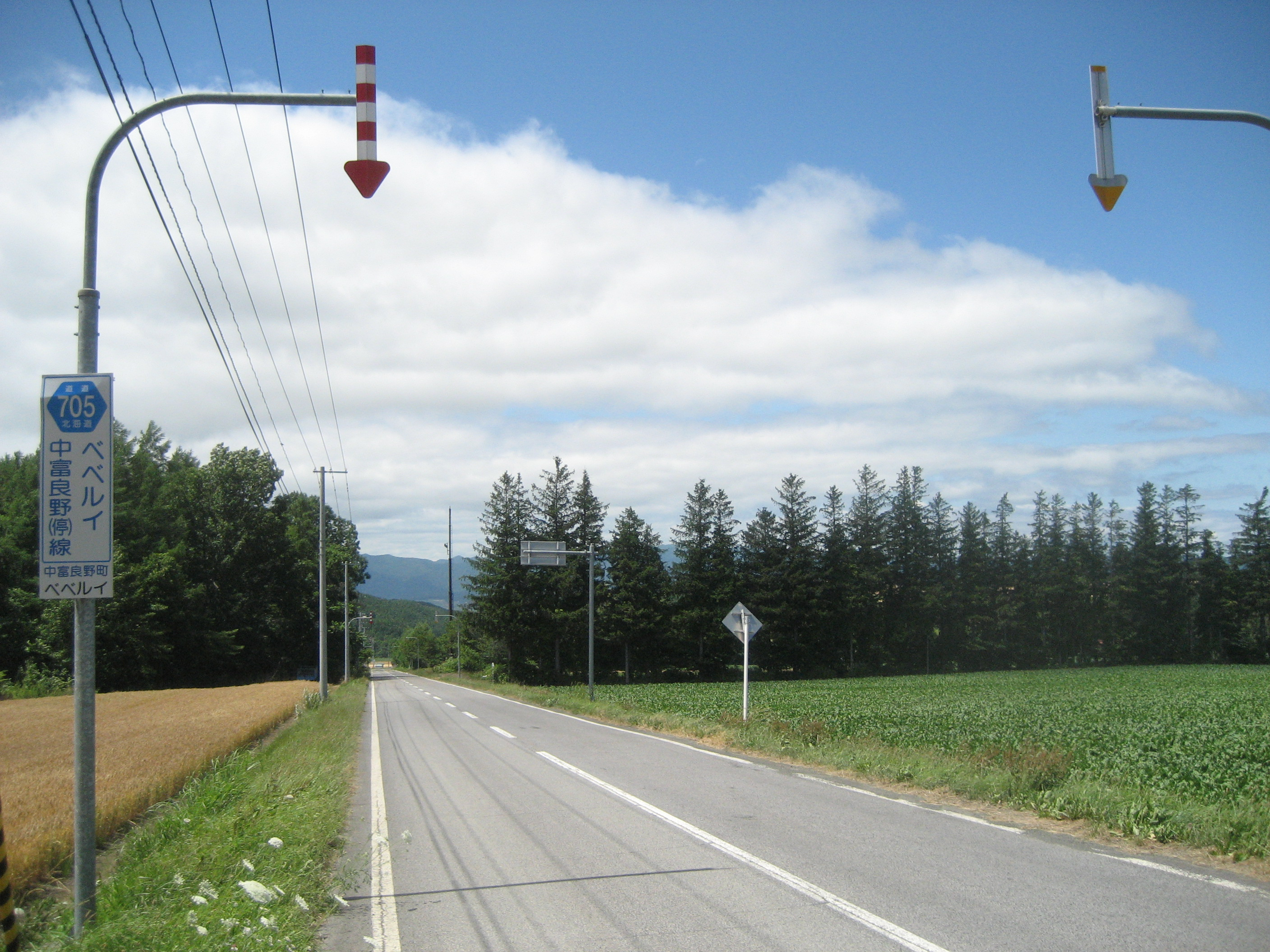 道道705号線中富良野町べべルイ付近